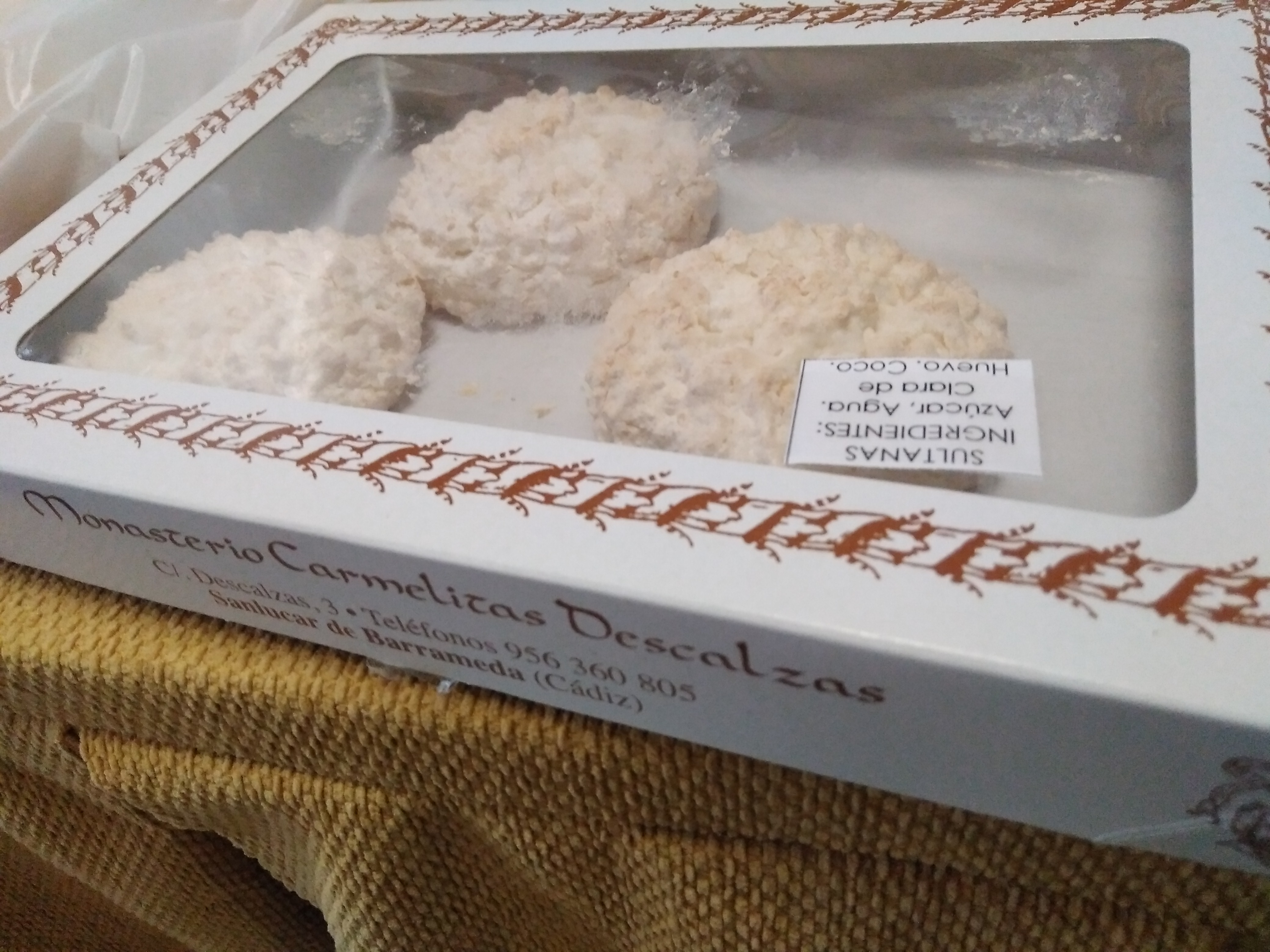 sultanas de coco del convento de Carmelitas Descalzas de Sanlúcar de Barrameda (España)